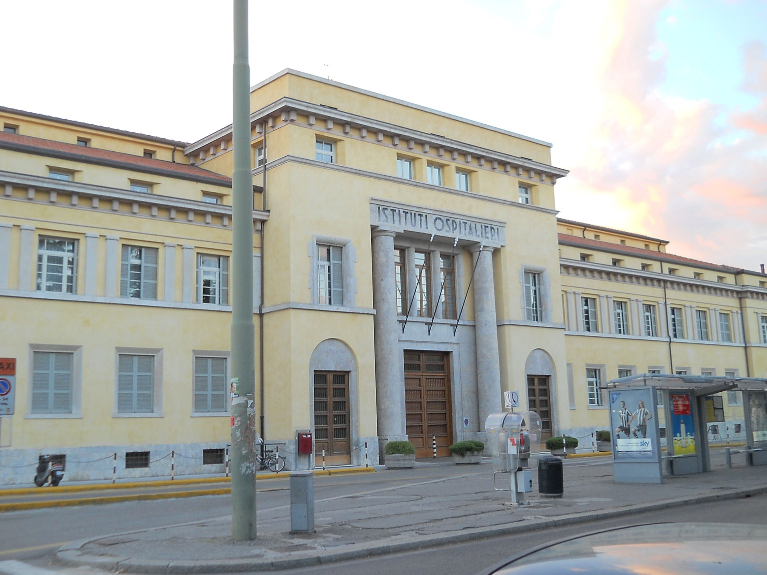 Facciata dell'ospedale civile maggiore di Verona